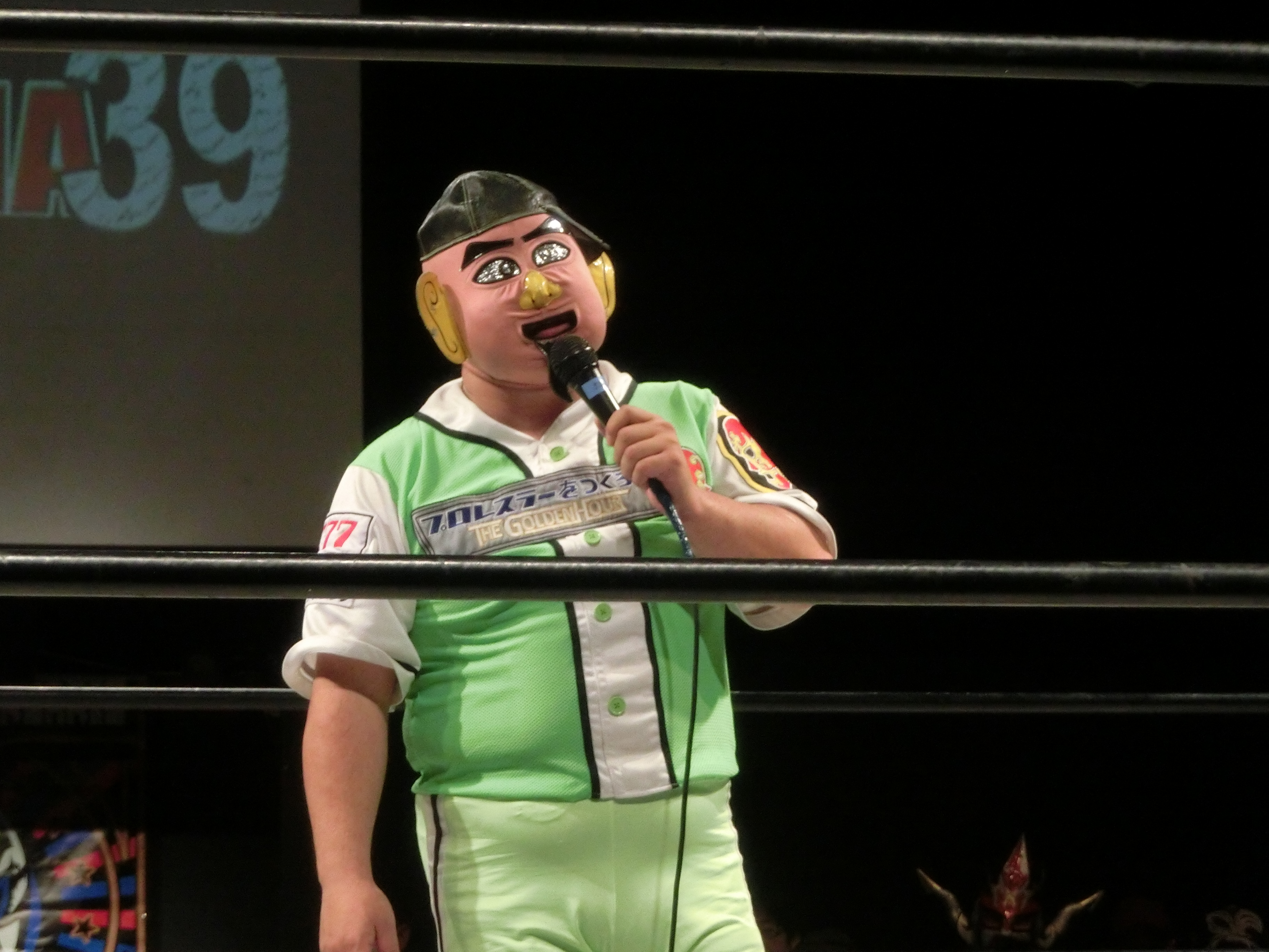 FUKUMEN-MANIA201802